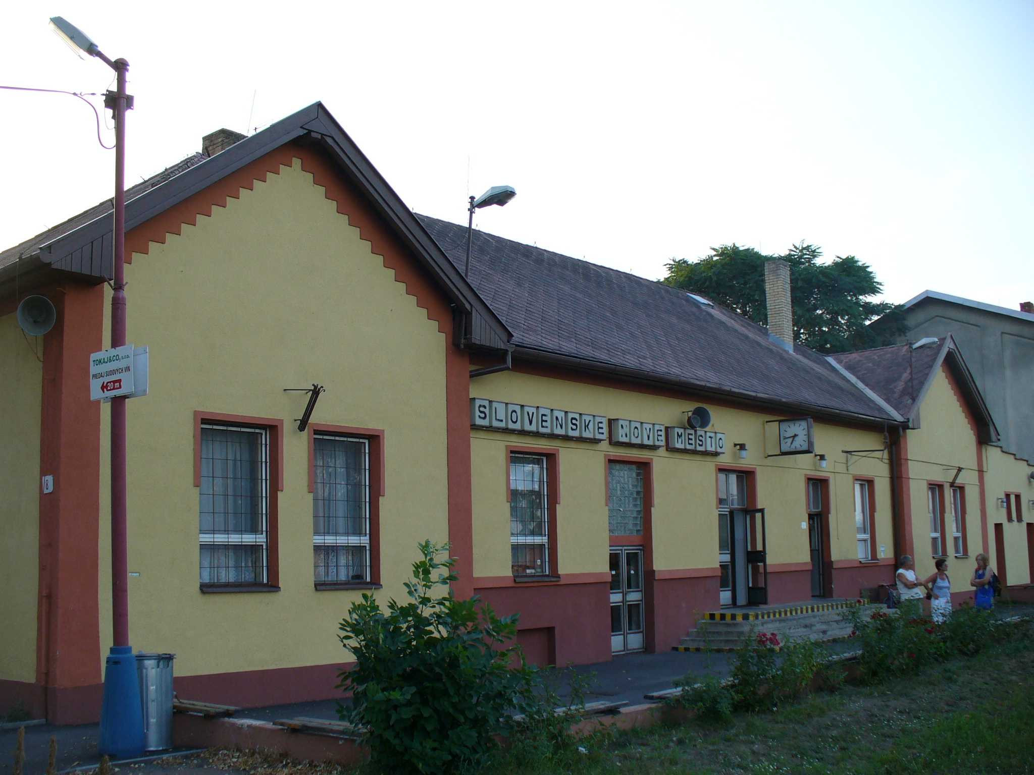 Slovenské Nové Mesto (Kisújhely). Zeleznicna stanica